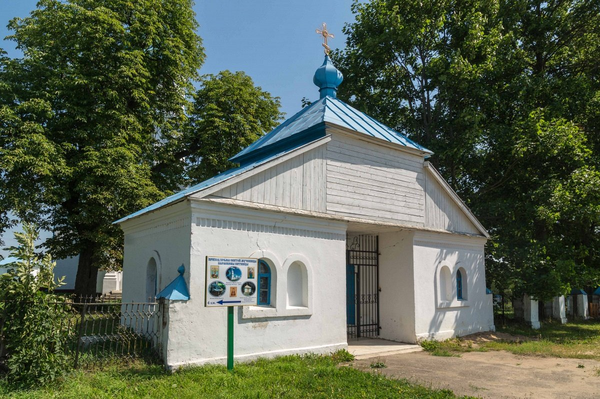 Чарневічы. Царкоўная брама